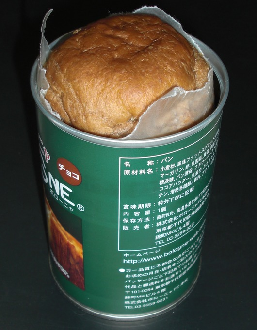 Canned bread (パンの缶詰)